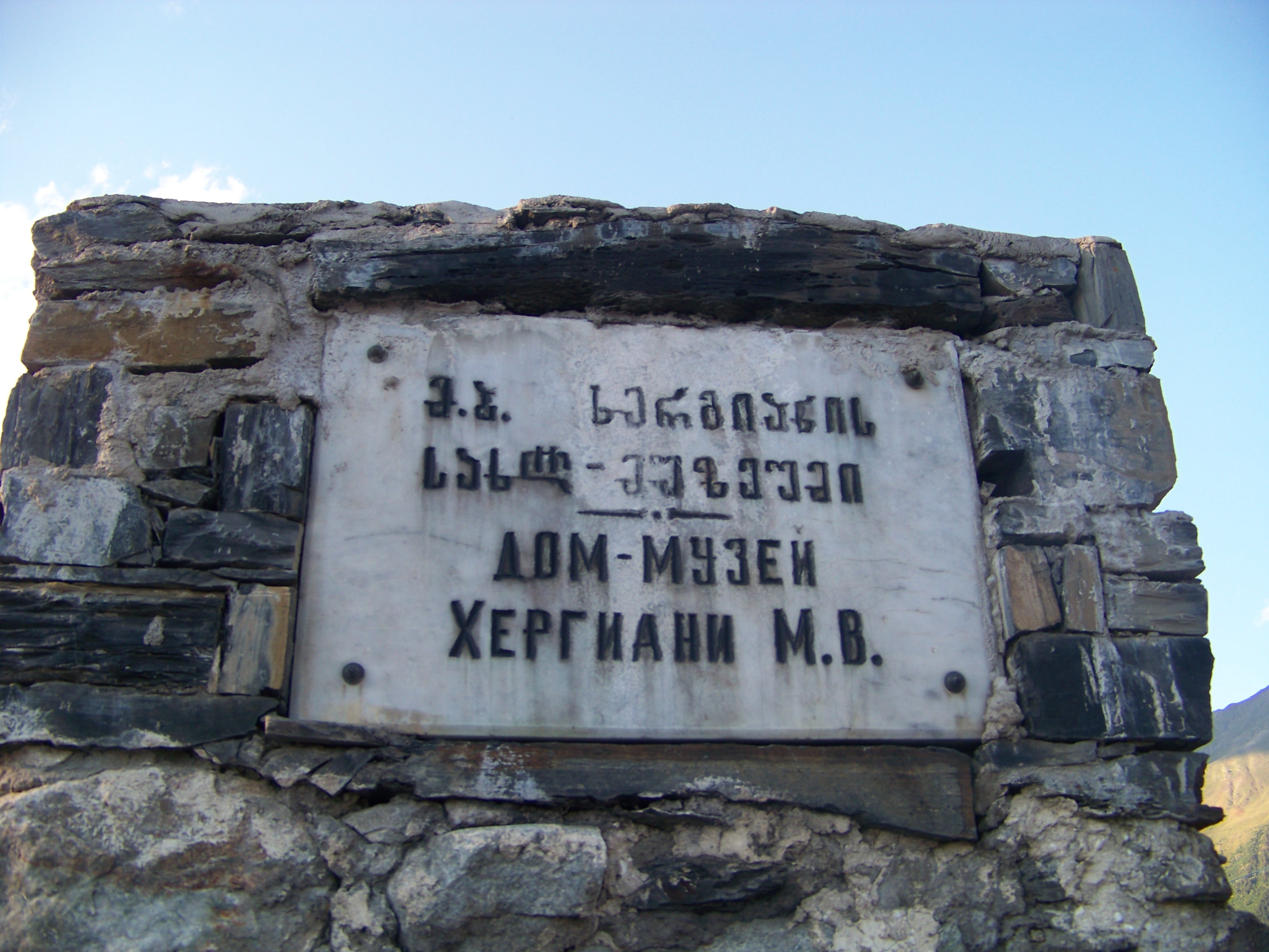 ხერგიანების კოშკი (№1)